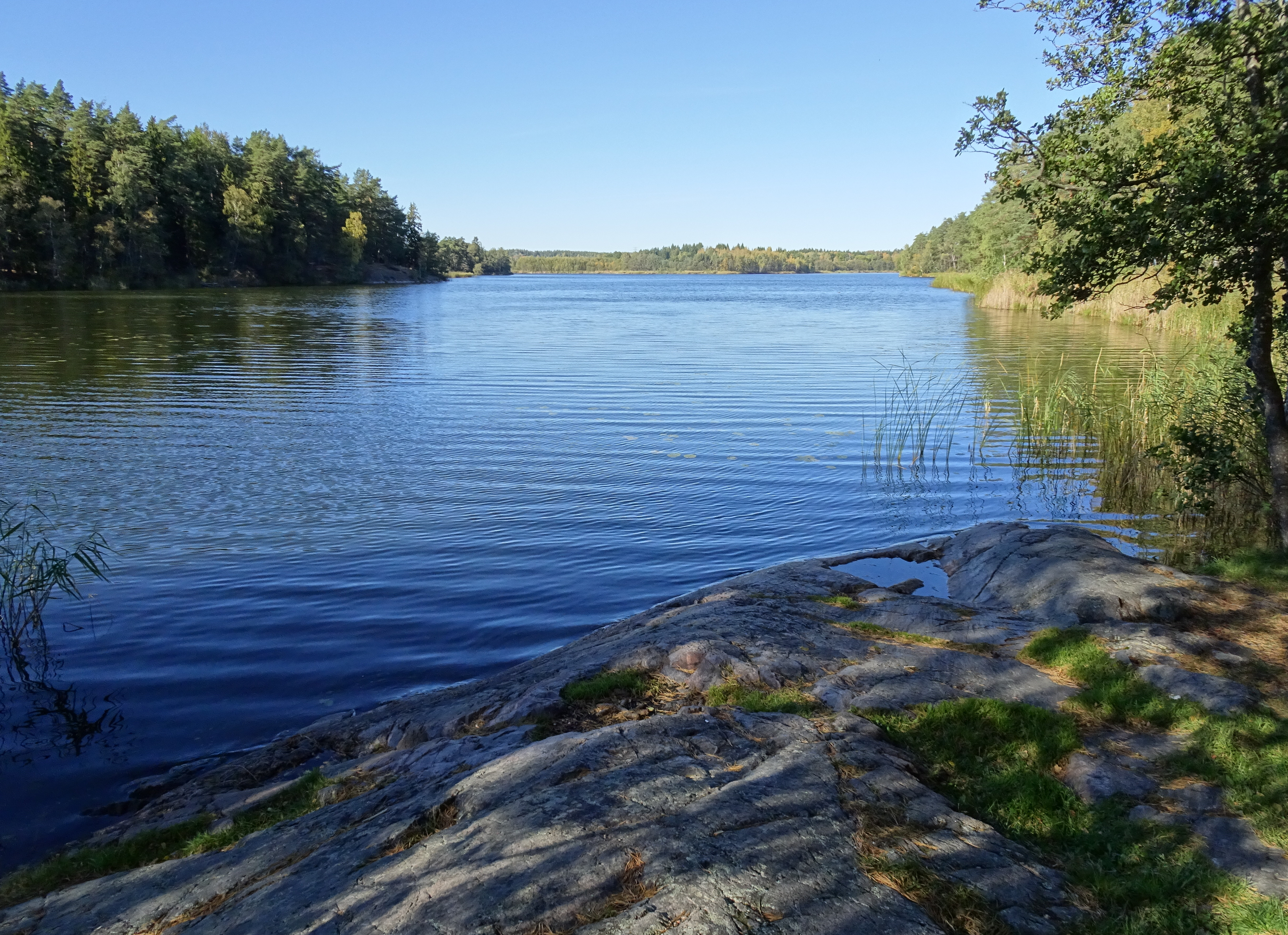 Översjön, vy mot norr